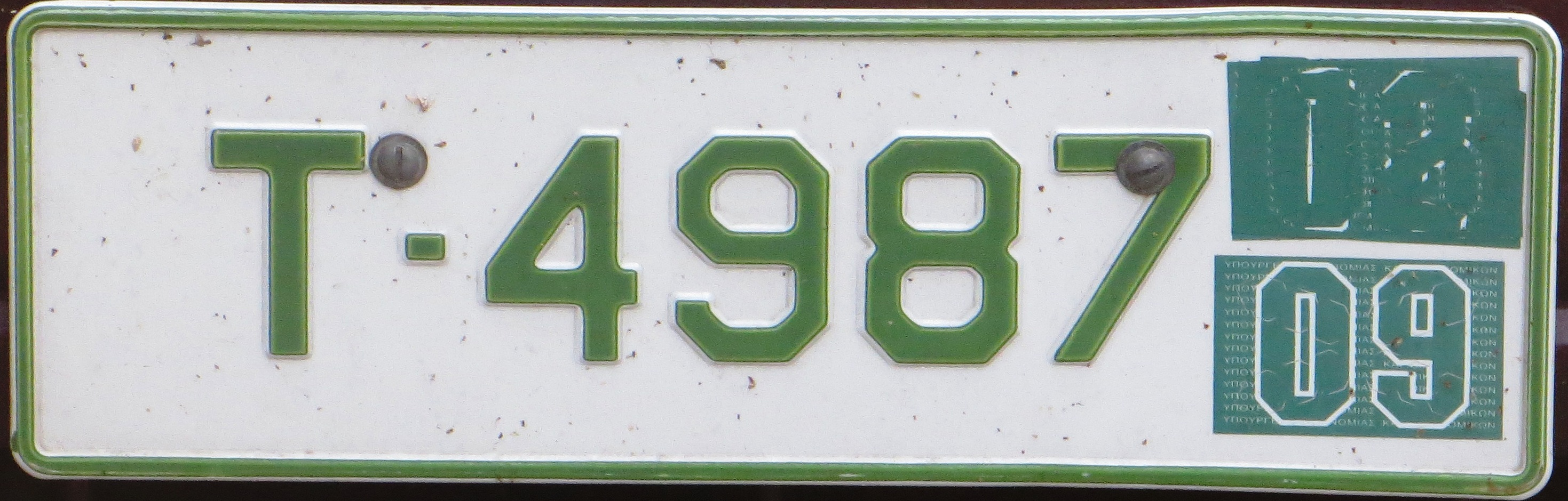 Grieks export kenteken